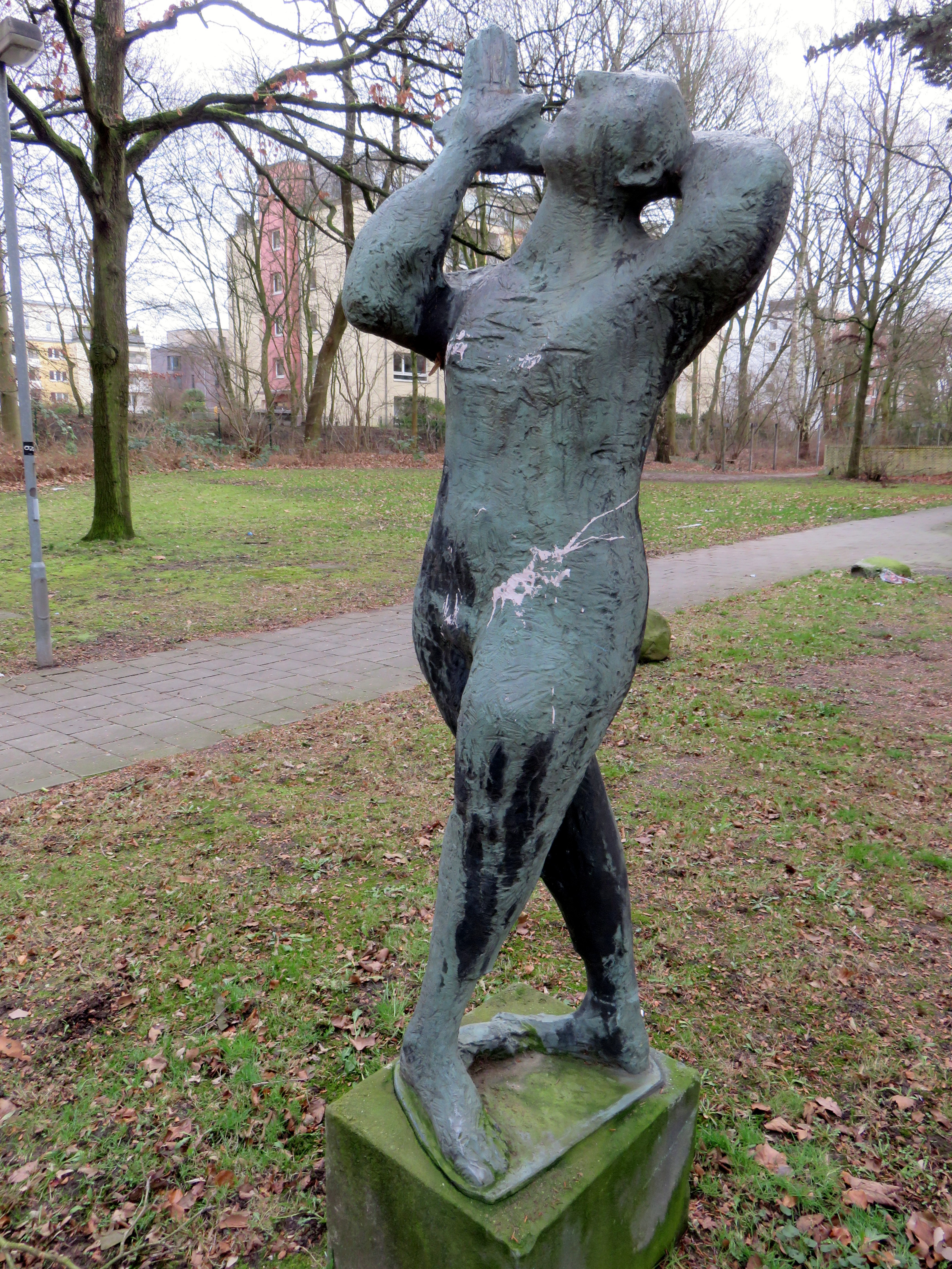 Bronze-Skulptur Pantomime, Grandweg 118–128 in Hamburg-Lokstedt. Die Skulptur wurde 1965 von der deutschen Bildhauerin Gisela Engelin-Hommes geschaffen und von der Düsseldorfer Kunstgießerei Schmäke realisiert.